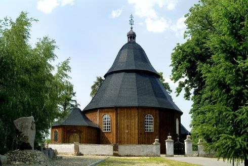 Wyszyna - kościół parafialny pw. Narodzenia MB IV-73/82/53.